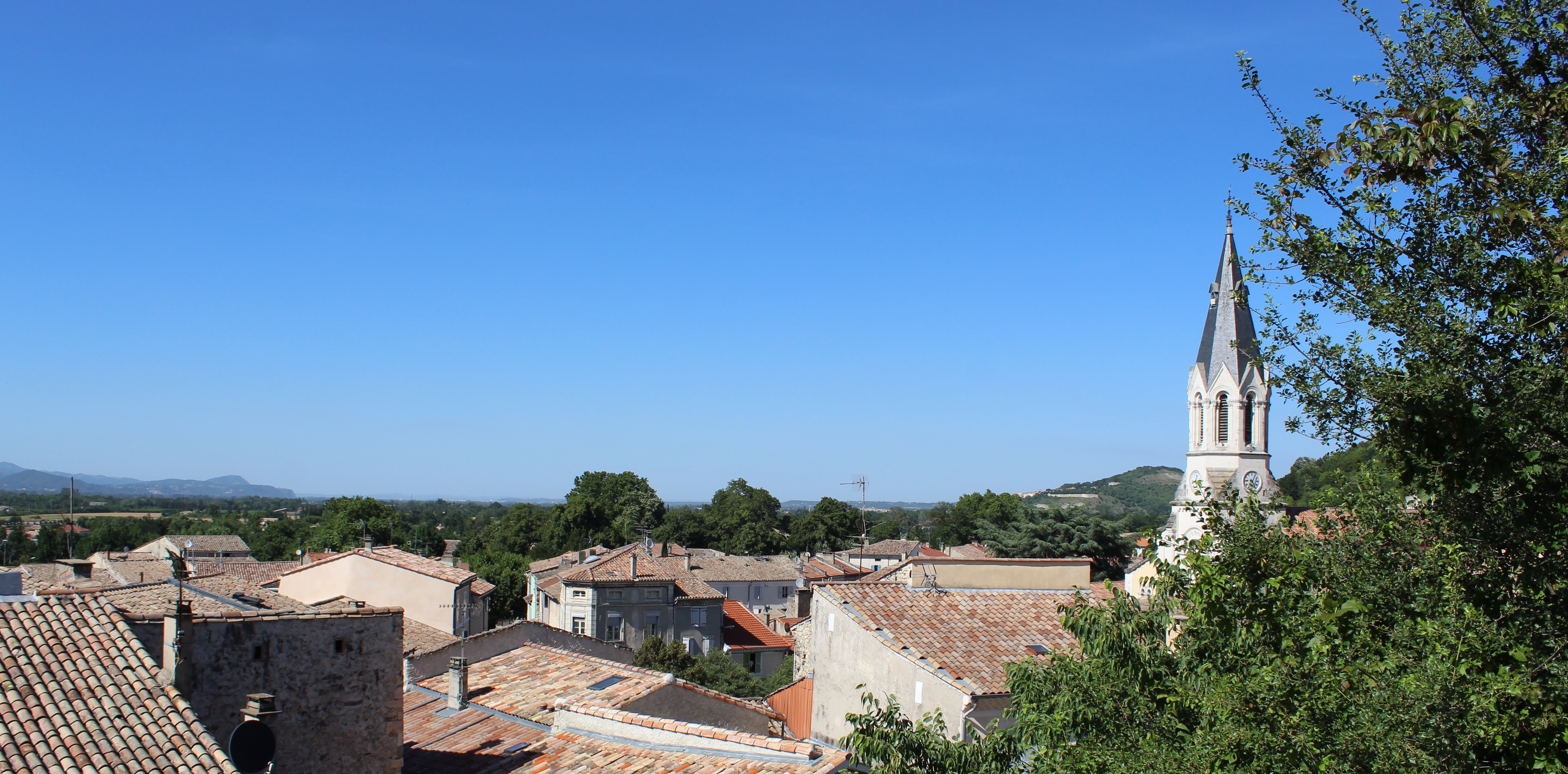 Panorama du village.